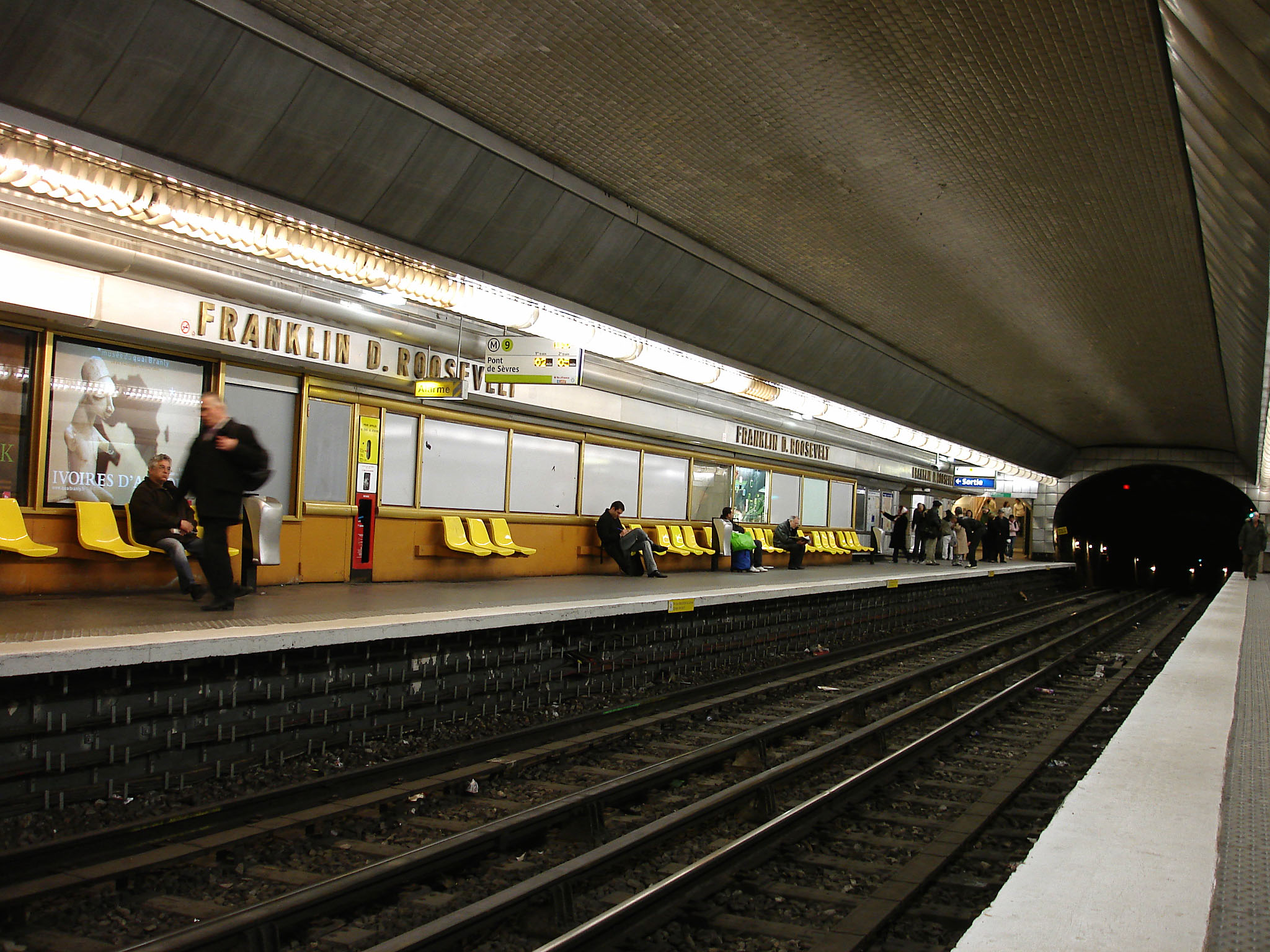 La station Franklin D. Roosevelt de la ligne 9 du métro de Paris, France